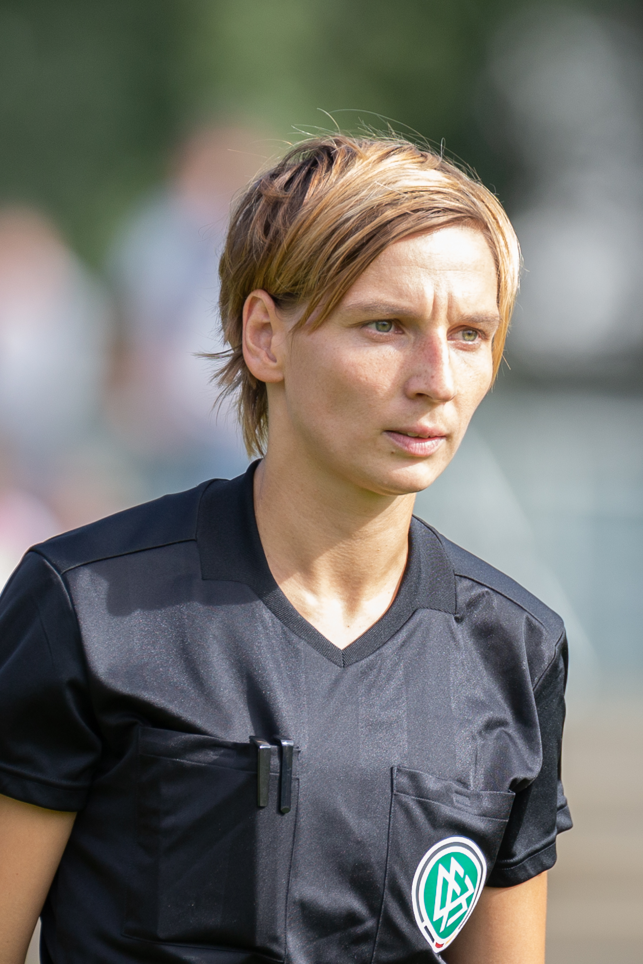 Fußball, DFB-Pokal Frauen, FF USV Jena - FC Bayern München; Christine Weigelt (Linienrichterin, assistant referee)